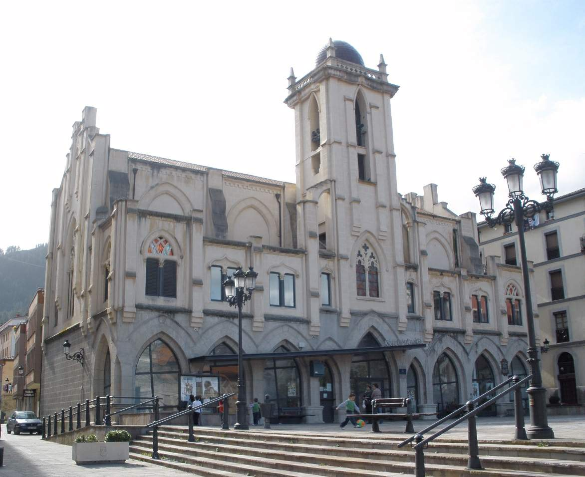 Antigua iglesia del Sagrado Corazón (Claretianos) de Balmaseda, Bizkaia. Hoy, edificio cultural 'Klaret Antzokia'.